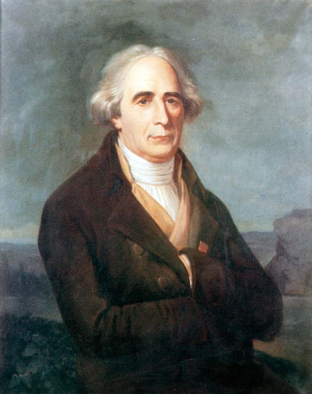 Portrait de Joseph de Montgolfier (1740-1810)